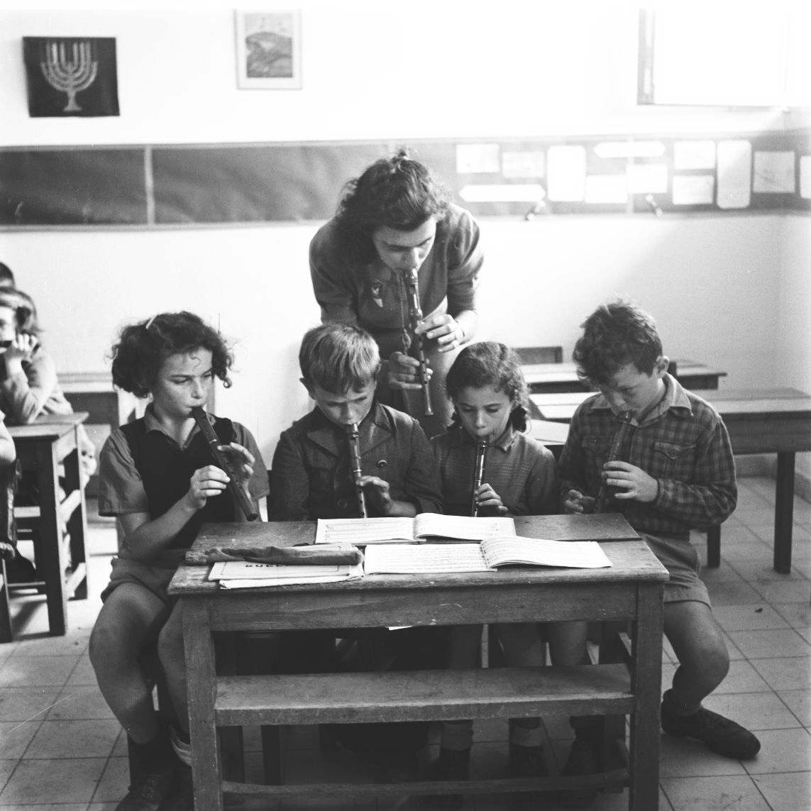 אוסף צילומים של הצלם זולטן קלוגר טווח מספרי התשלילים 26048 - 26085: שיעור חלילית בבית ספר עממי בתל אביב